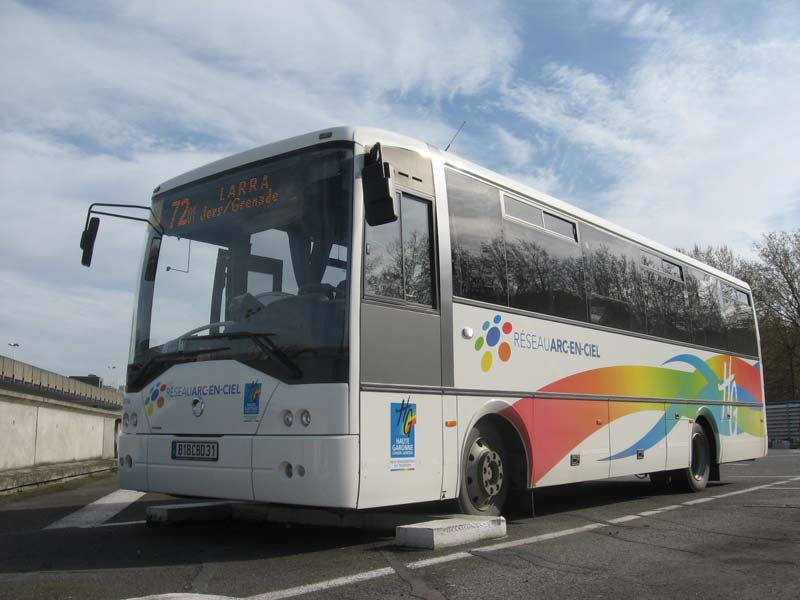 cars irrisbus de haute-garonne